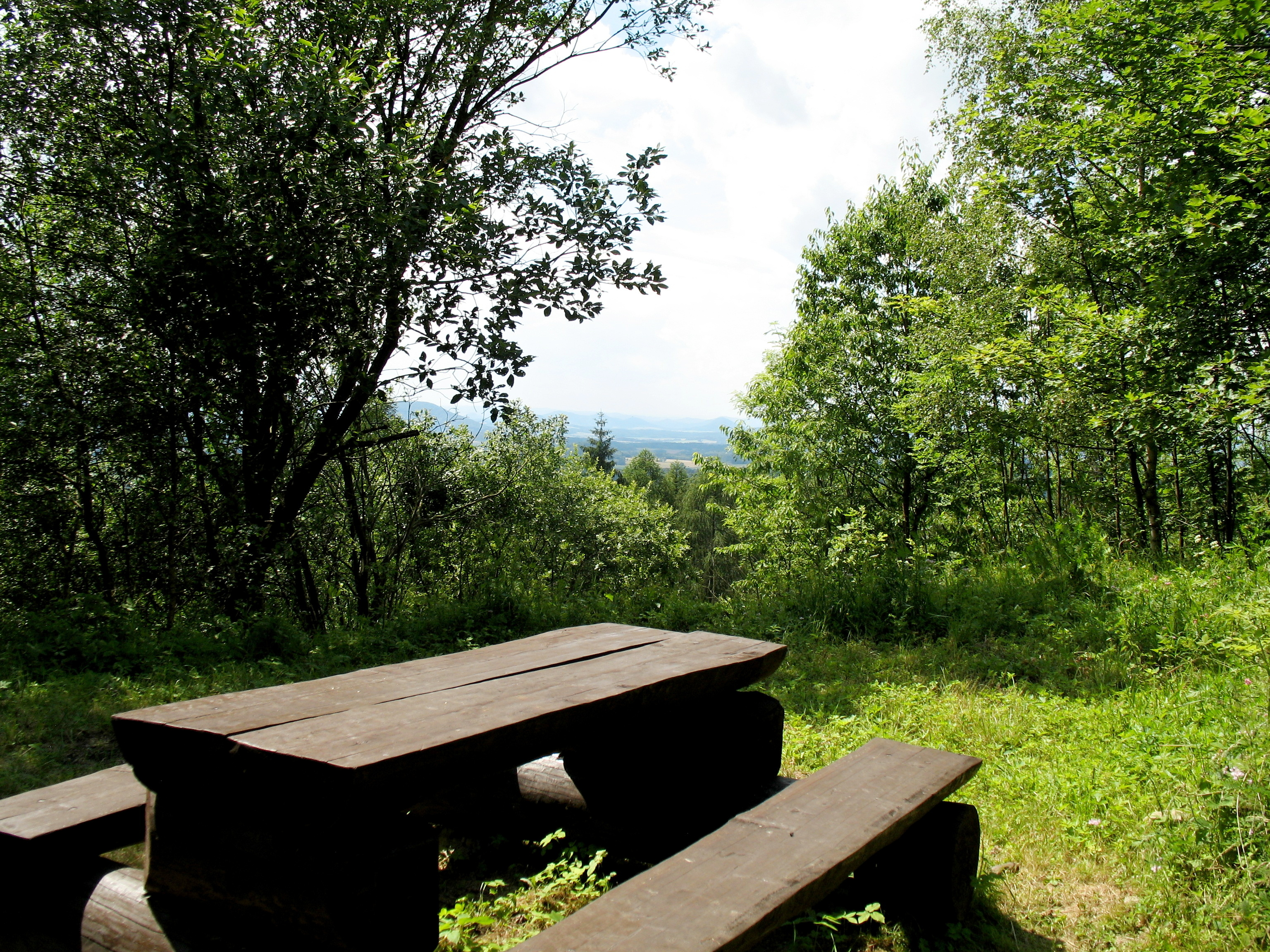 Solvayův lom u Křižan. Vyhlídka z bývalého lomu